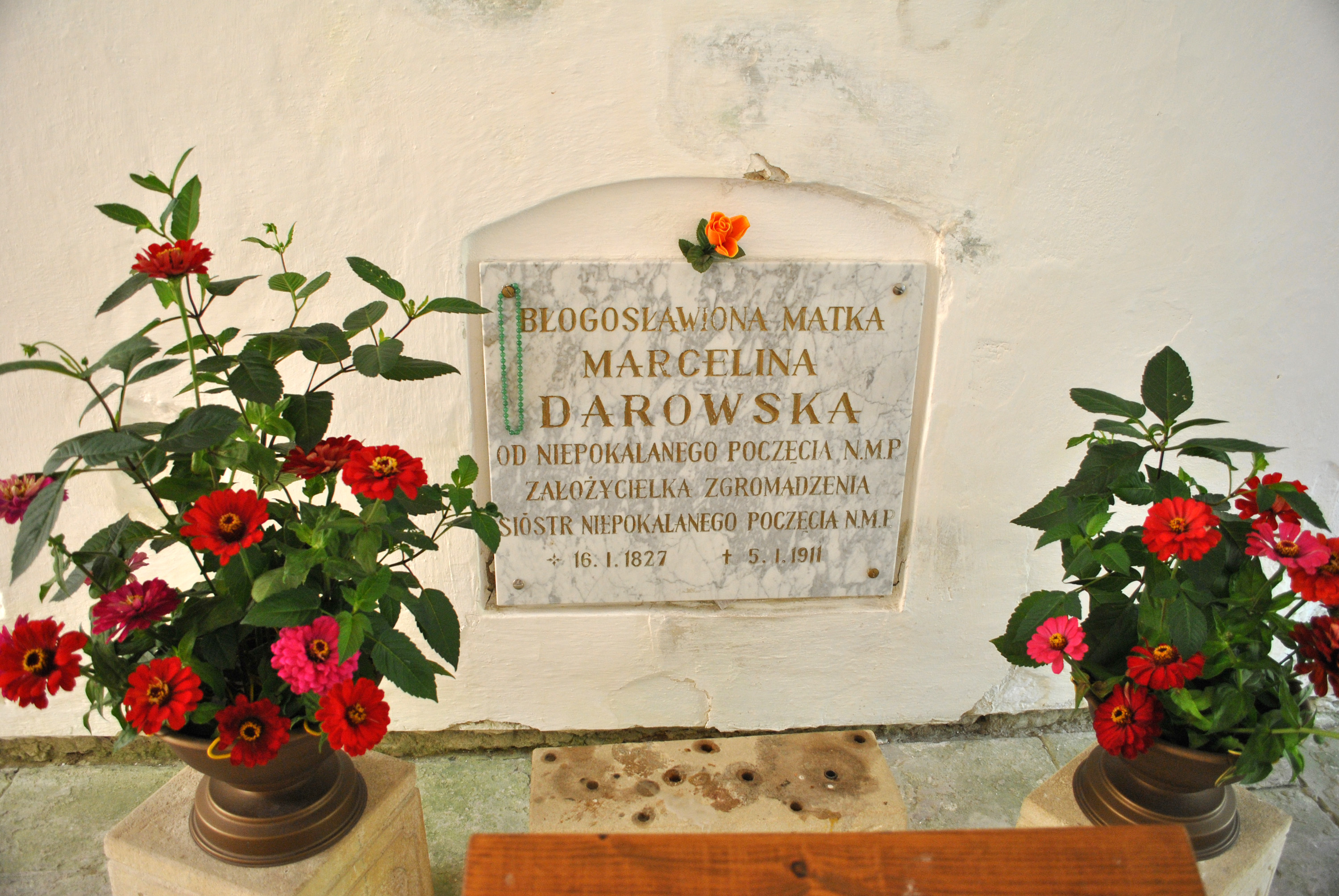 Гріб Блаженної Марцеліни Даровської (мур.) у гробниці сестер-монахинь у селі Язловець Бучацького району Тернопільської області.